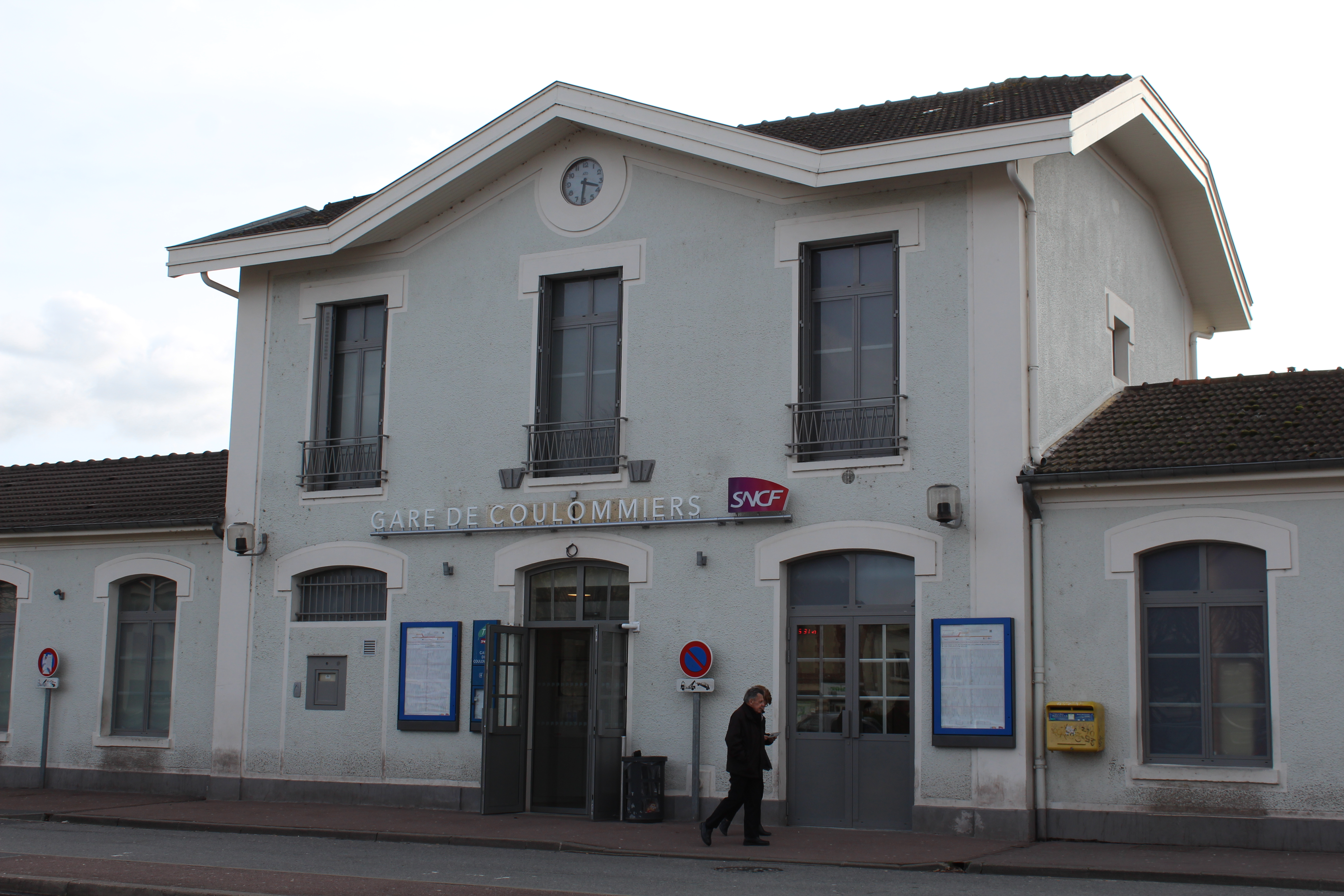 Gare de Coulommiers.